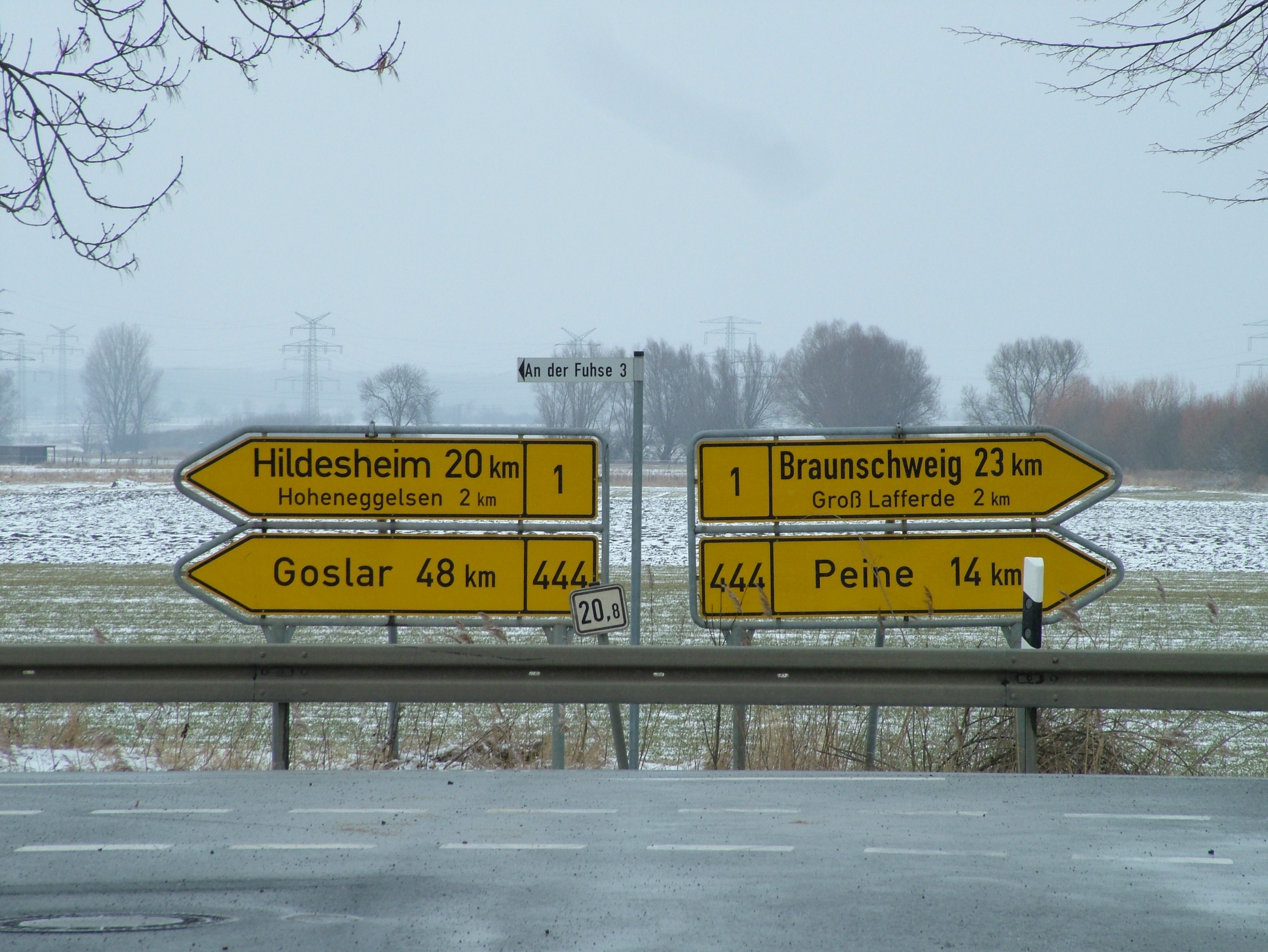 Ein Strassenschild der B1 und B444 im Ort Sölde, Ortsteil Steinbrück